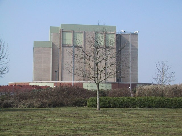 Berkeley Power Station